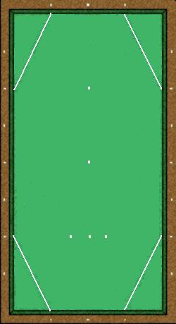 Partie libre table